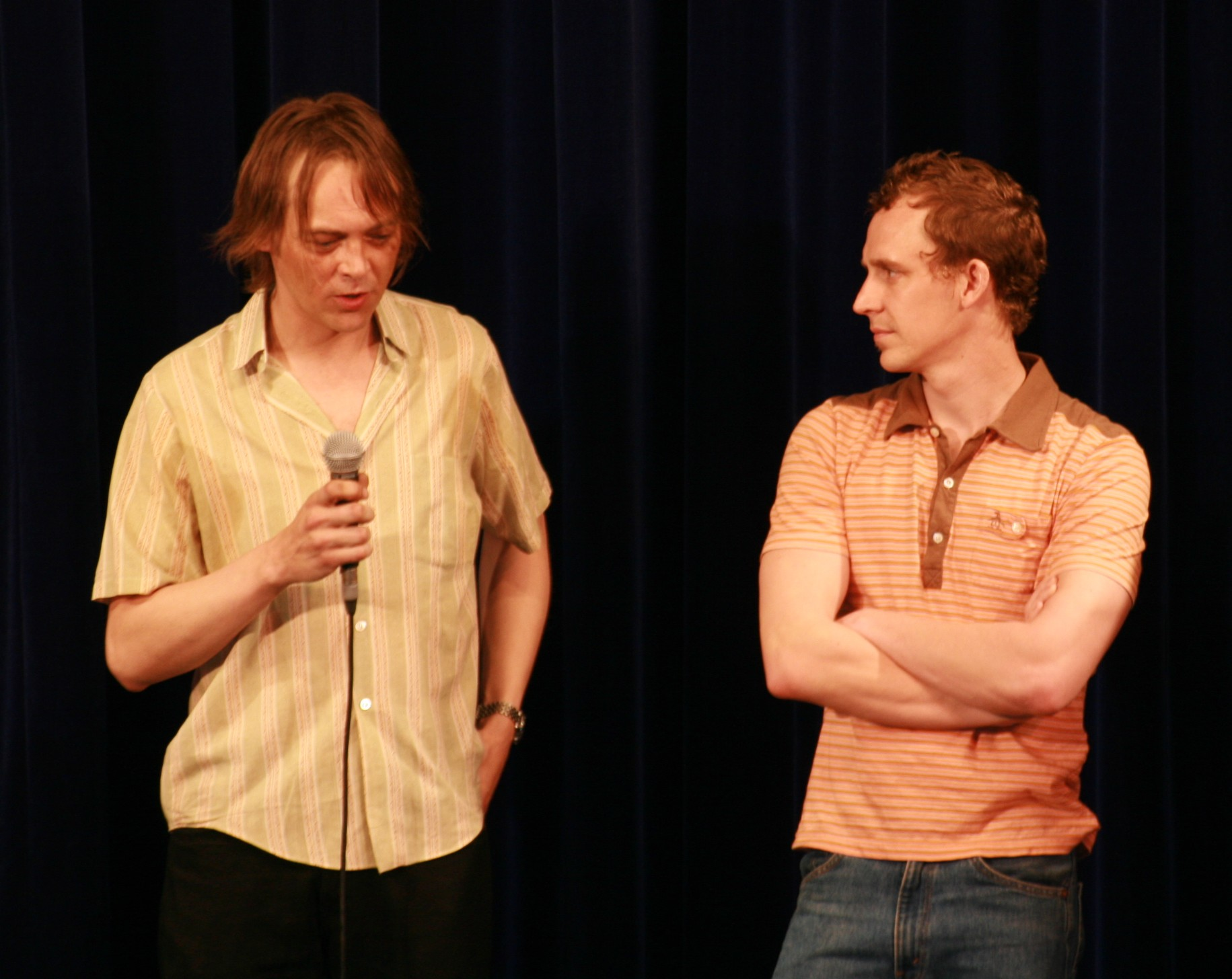 Chris Lavis et Maciek Szczerbowski lors de la 46è Semaine de la Critique à Cannes en 2007